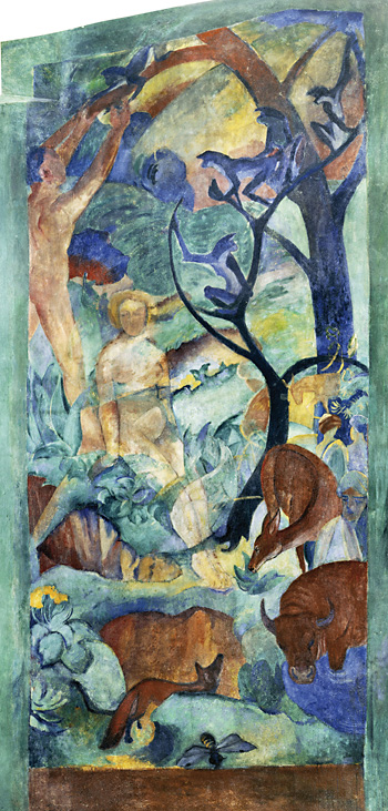 Gemeinsam geschaffenes Wandbild in Mackes Haus, 1980 abgetragen und wiedererrichtet im LWL-Landesmuseum für Kunst und Kulturgeschichte, Münster